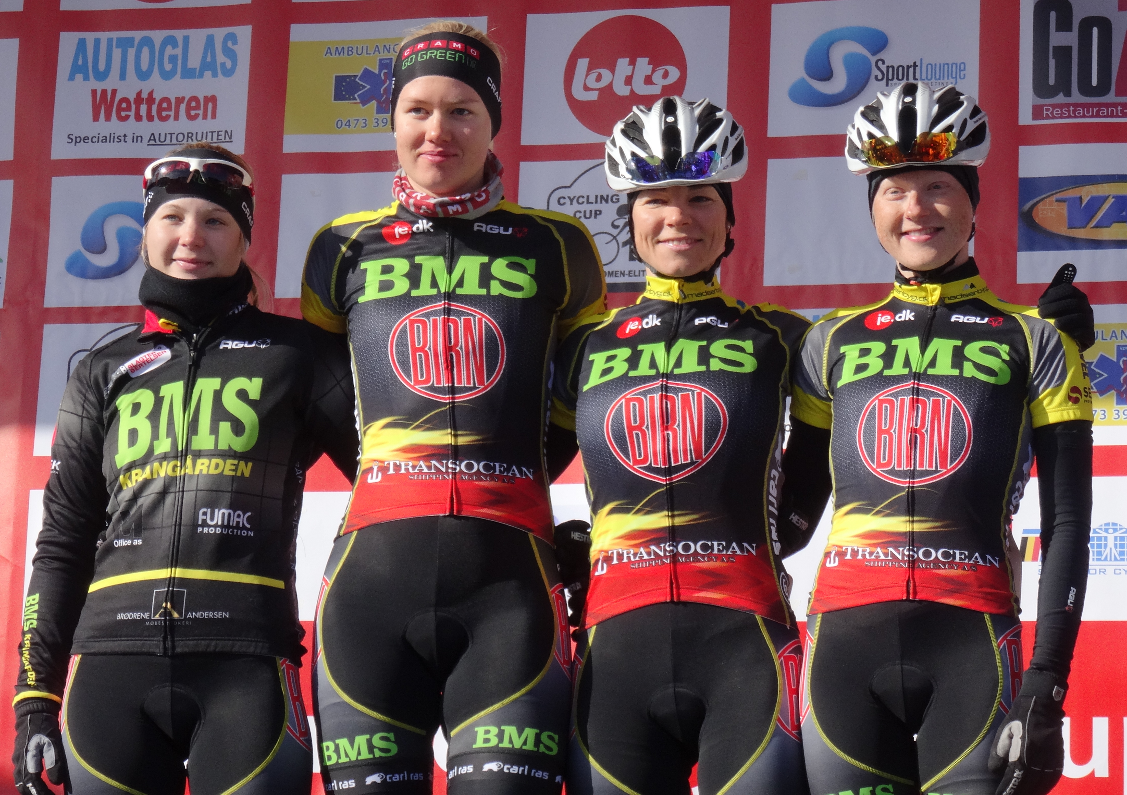 Reportage réalisé le mercredi 4 mars à l'occasion du départ du Samyn des Dames 2015 et du Samyn 2015 à Quaregnon, Belgique.